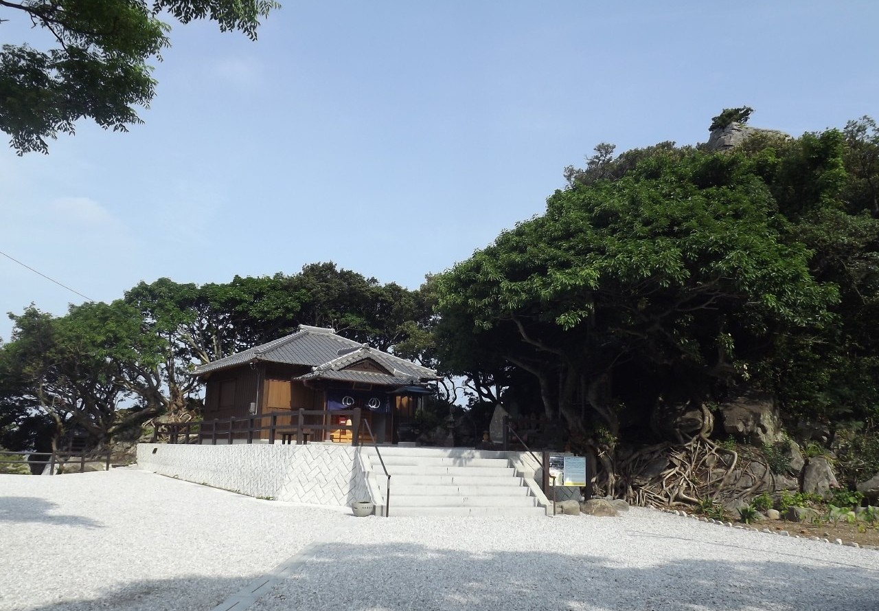 不動岩の不動堂周辺は平成２３年に整備された